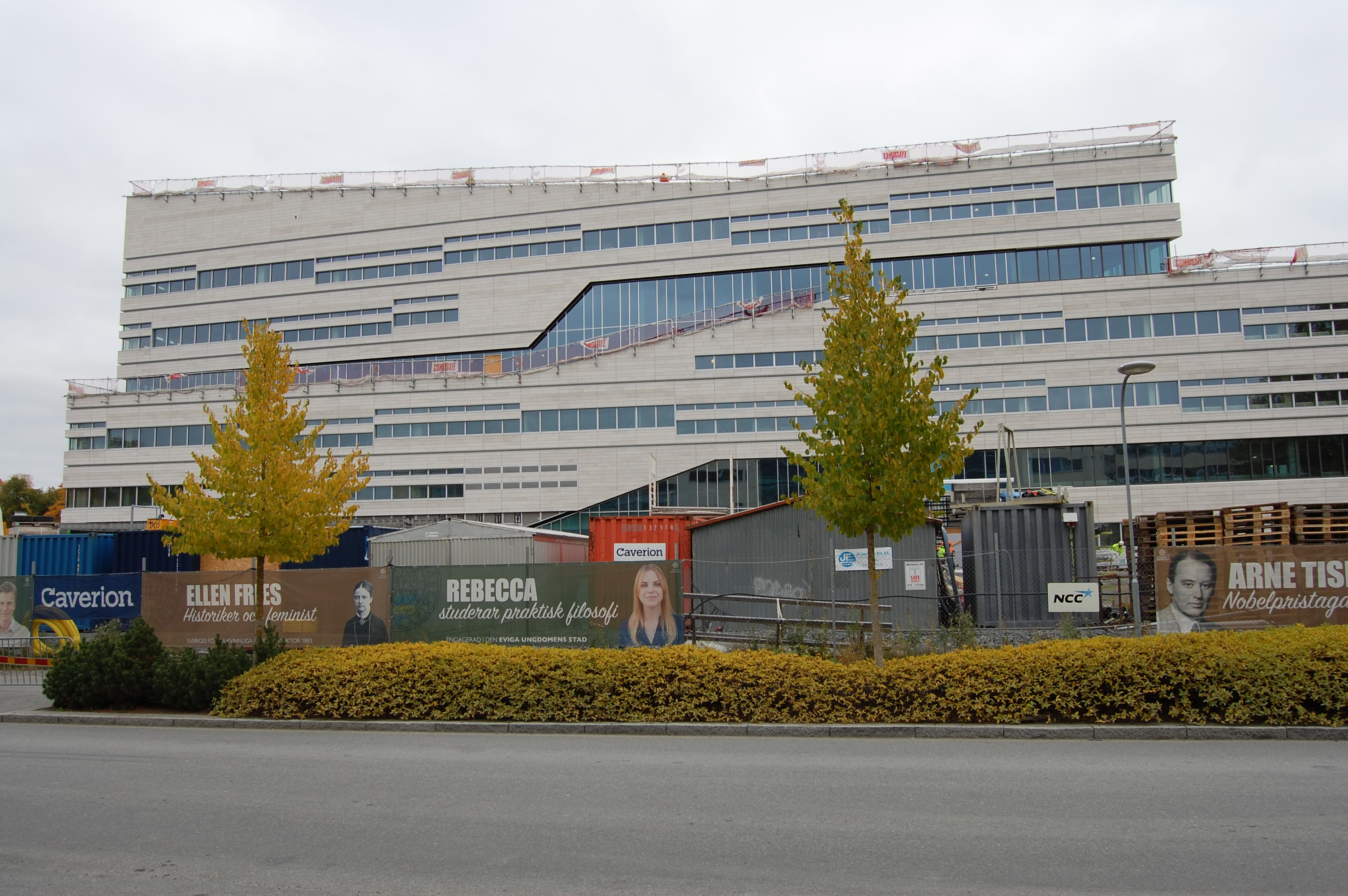 Segerstedthuset i Uppsala, perspektiv från Campus Blåsenhus. Fotograferad i oktober 2016